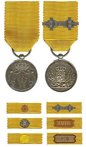 Onderscheidingsteken voor Langdurige, Eerlijke en Trouwe Dienst Nederland 1825